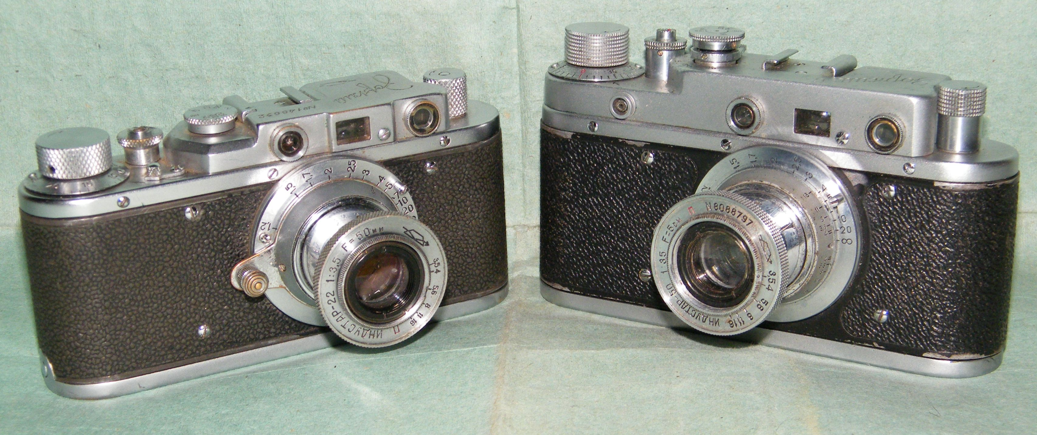 Зоркий и Зоркий-С (КМЗ)